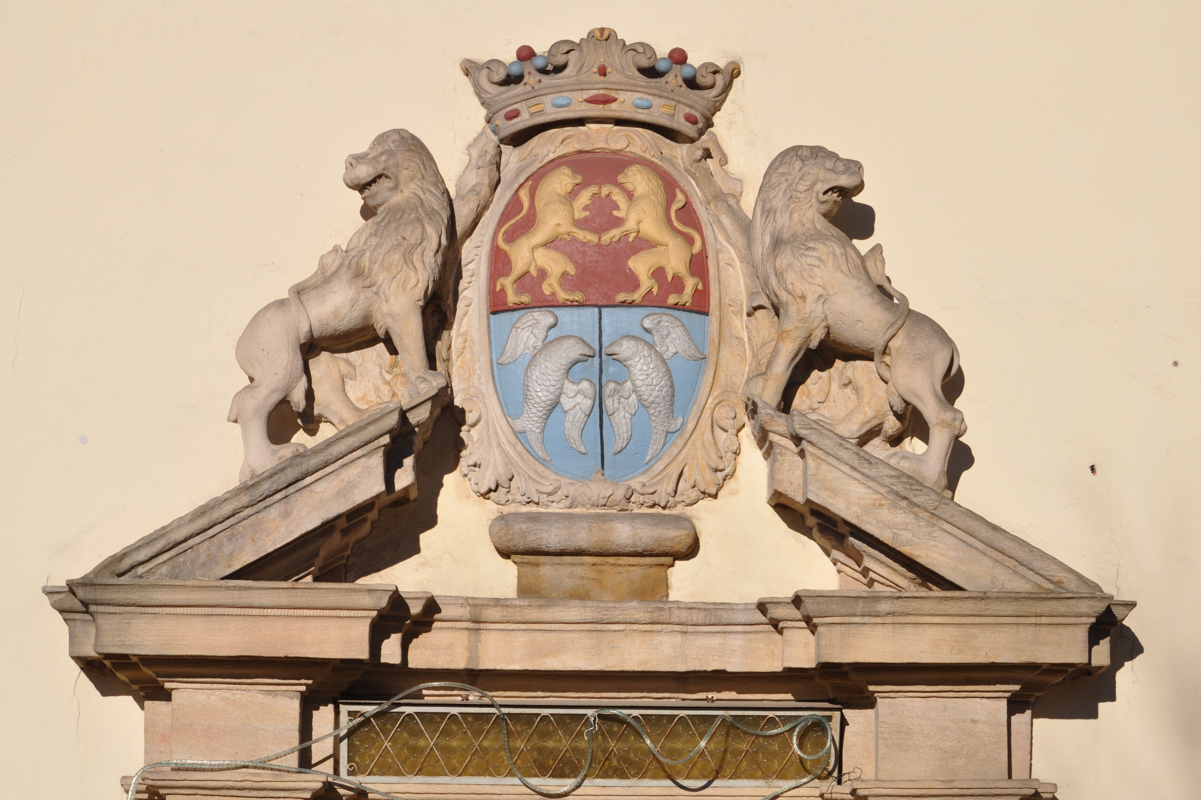 Detail des Portals, Schloss Schney in Lichtenfels-Schney.